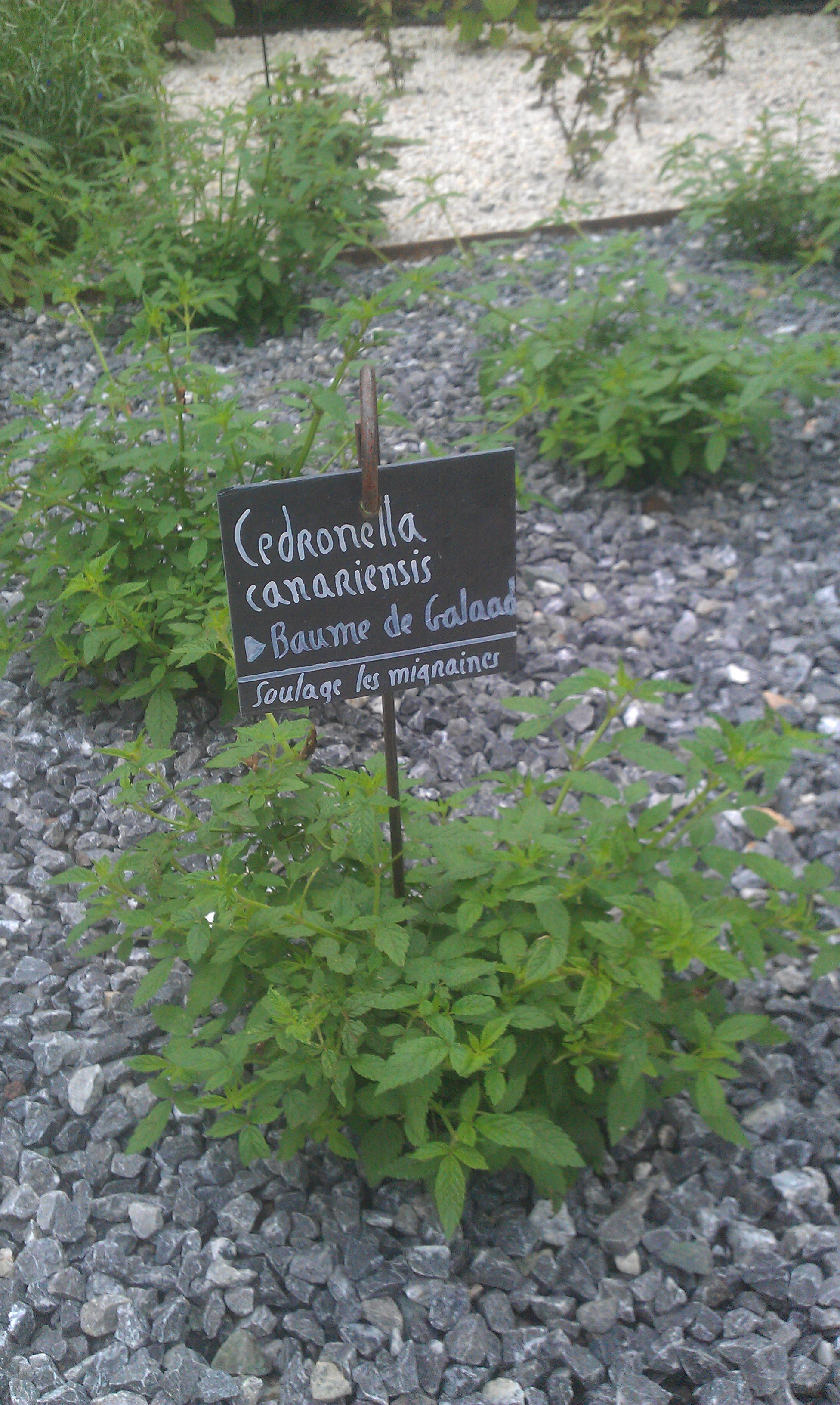 Cedronella à Terra Botanica